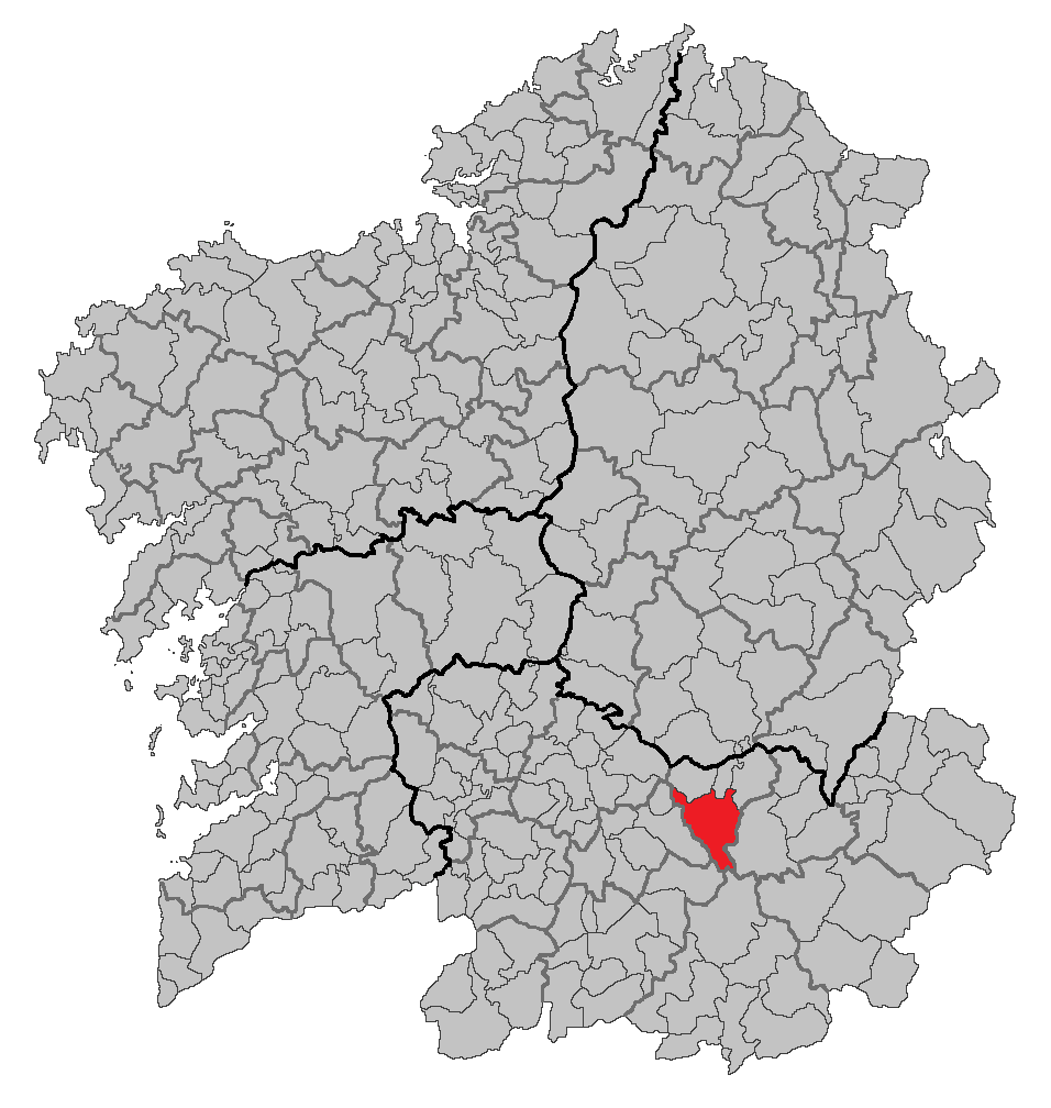 Mapa coa localización do concello de Montederramo.